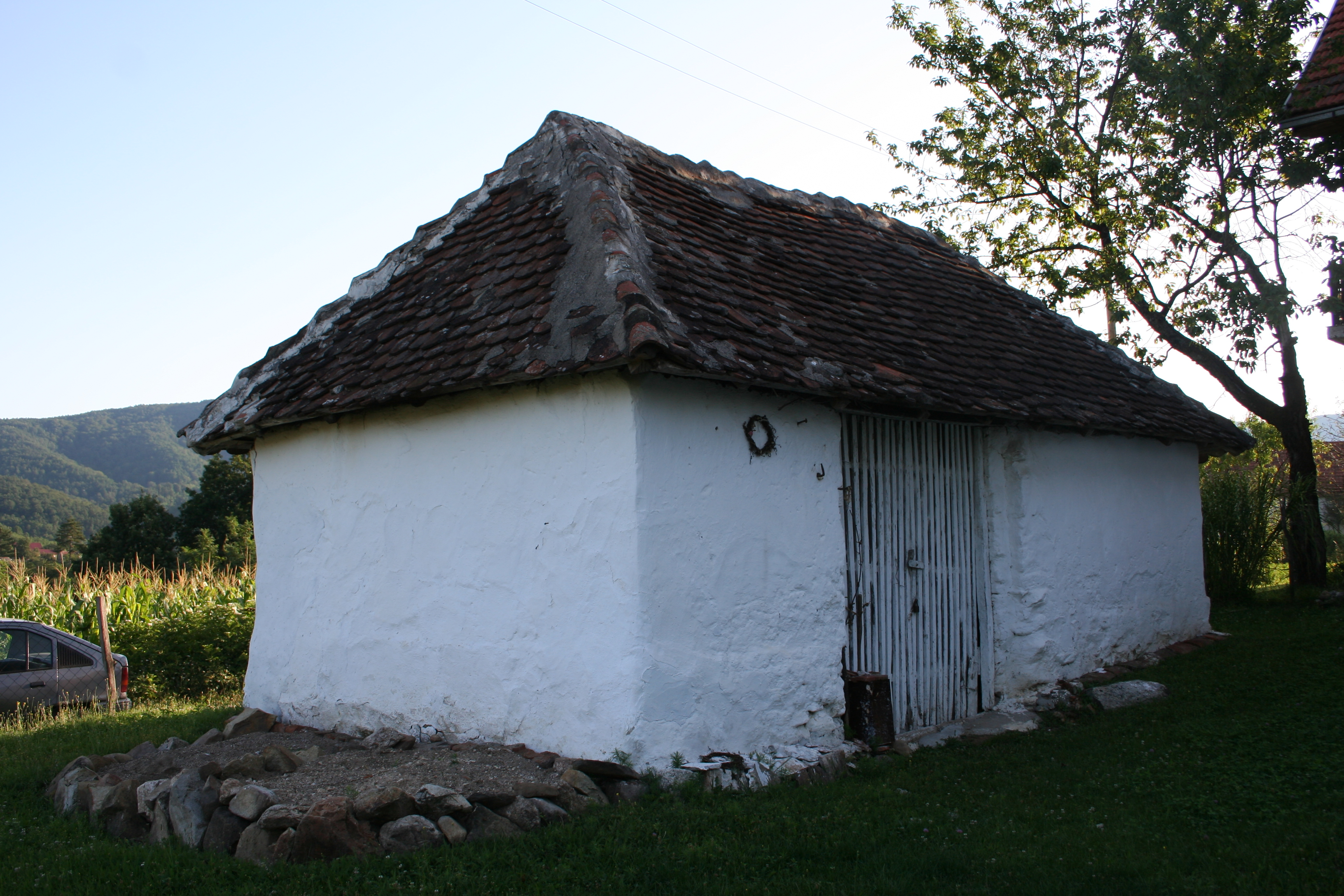 Okućnica Pavlović Jevrema, Trbosilje